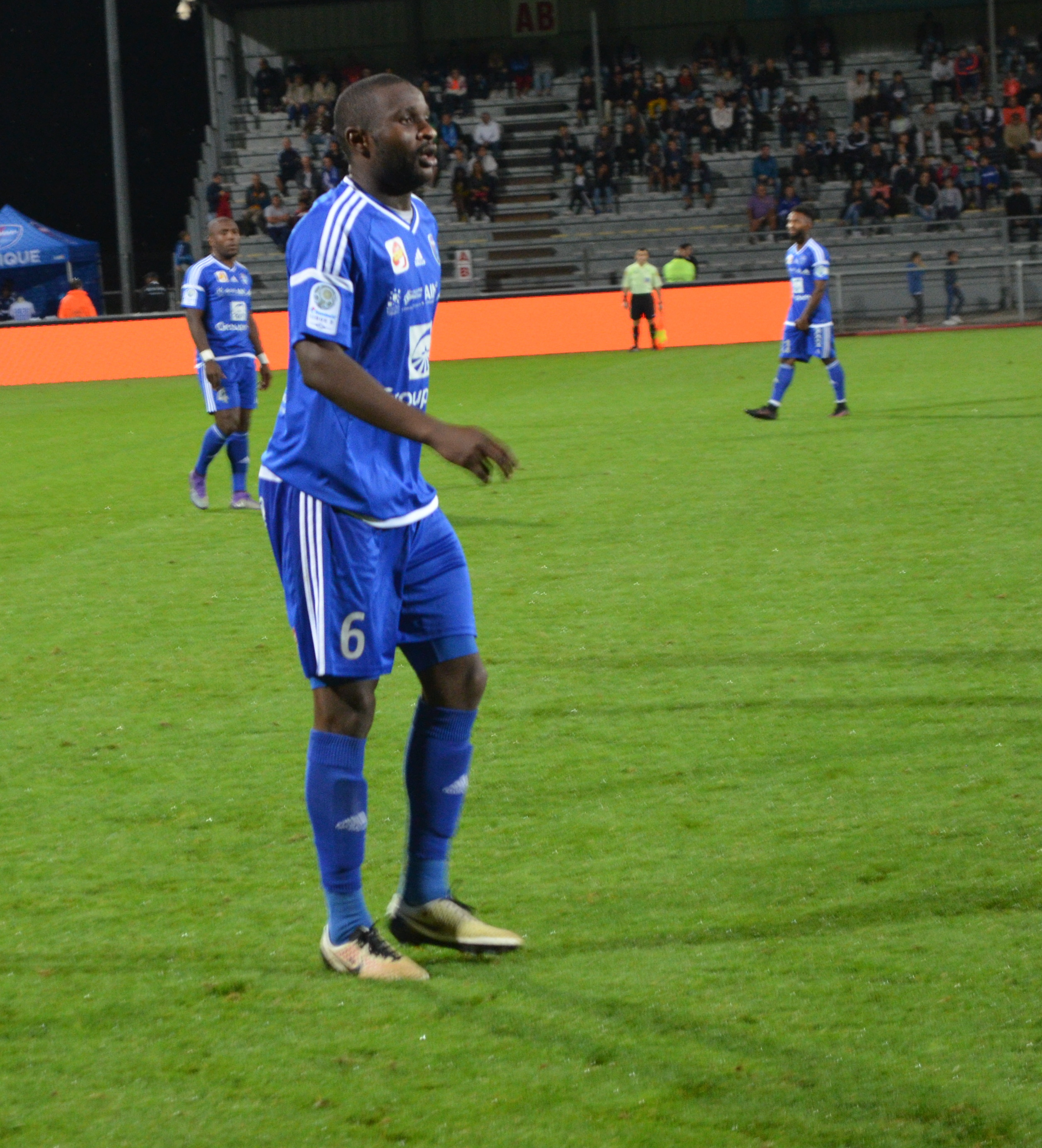 Clevid Dikamona durant le match de football de Ligue 2 française, FBBP01 - Havre AC (2-1), le 16 septembre 2016 au stade Verchère à Bourg-en-Bresse, dans l'Ain en France.